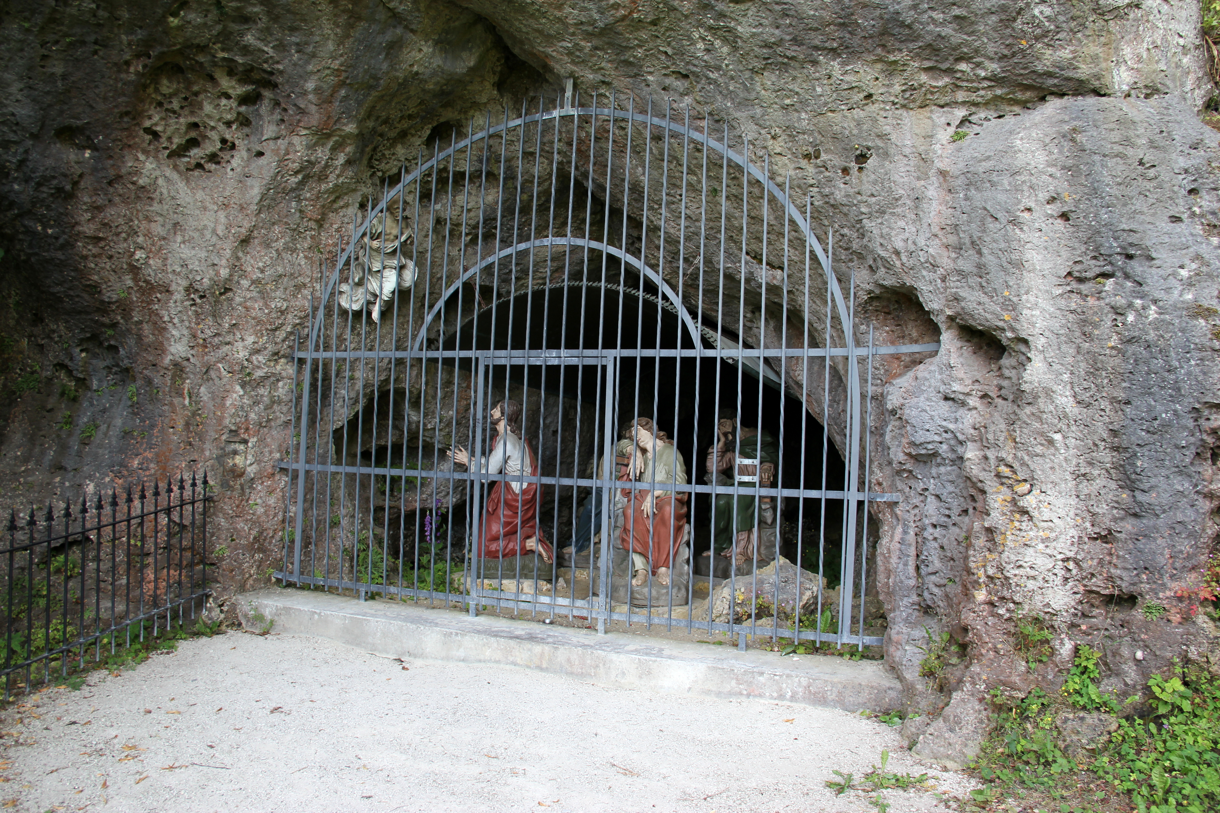 Ölberggrotte